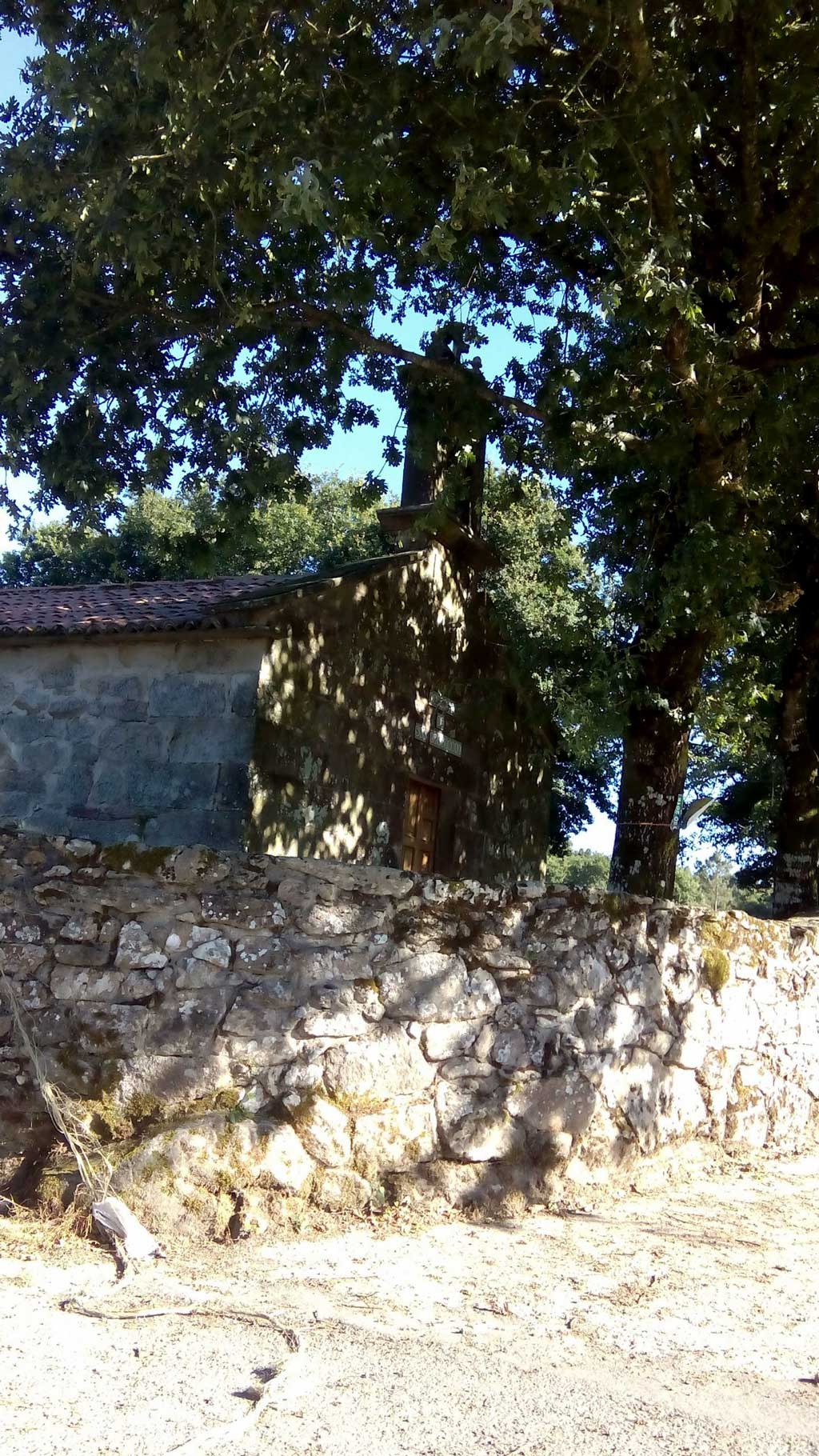 Igrexa de San Cristovo, Curtis.